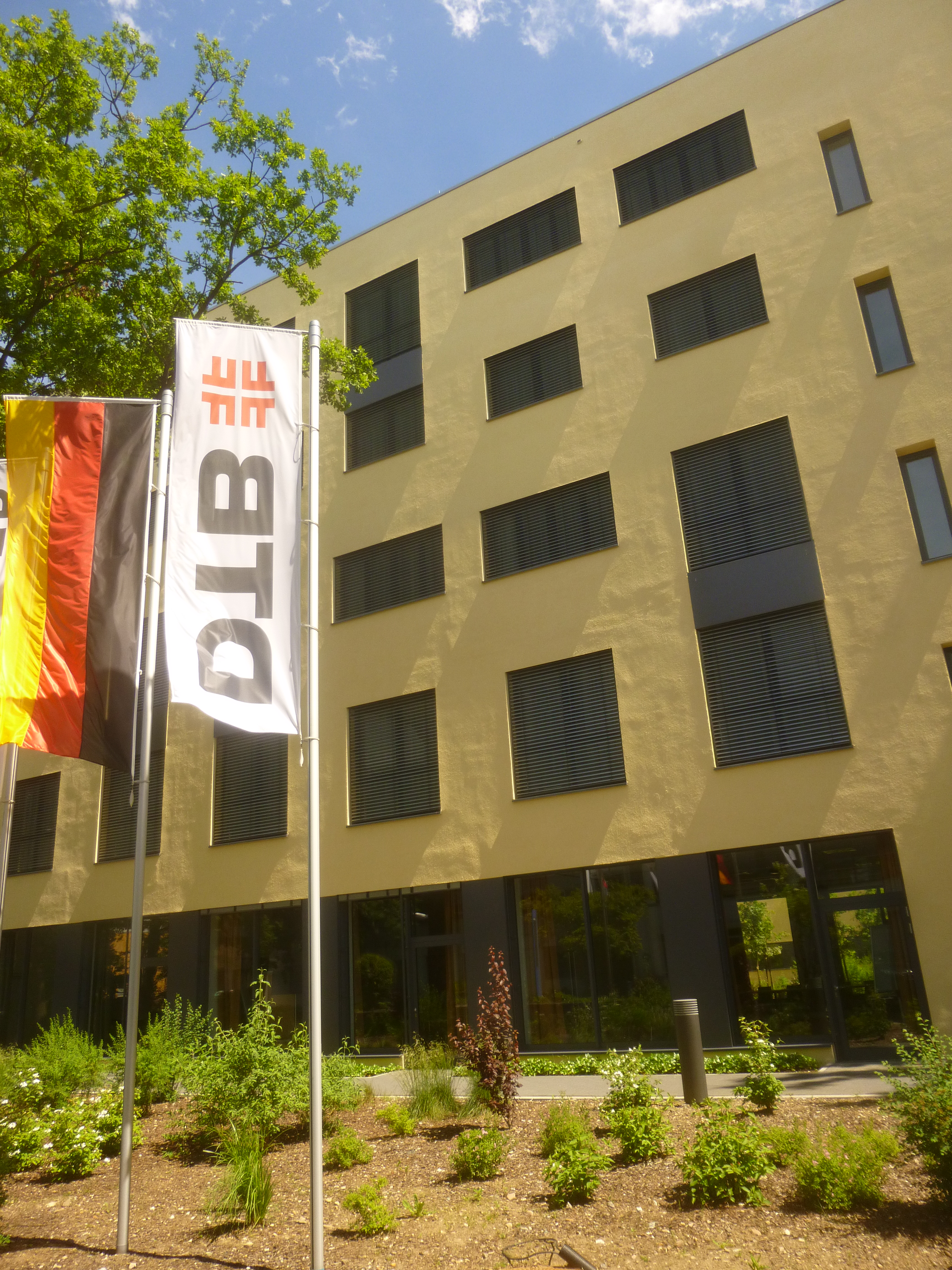 Bundesgeschäftstelle des Deutschen Turner-Bunds in Frankfurt am Main im Juni 2013